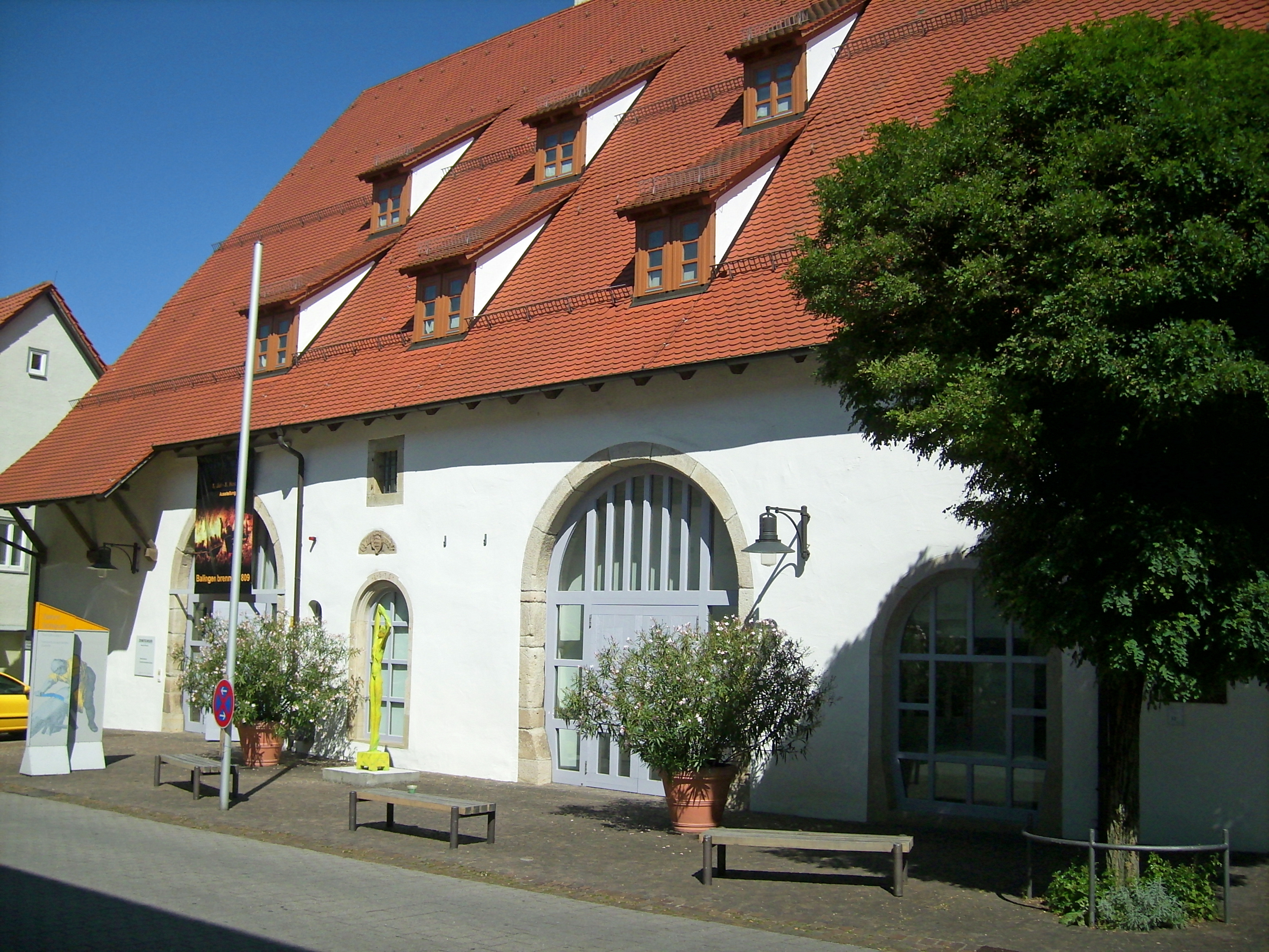 Zollernschloss Balingen Zehntscheuer